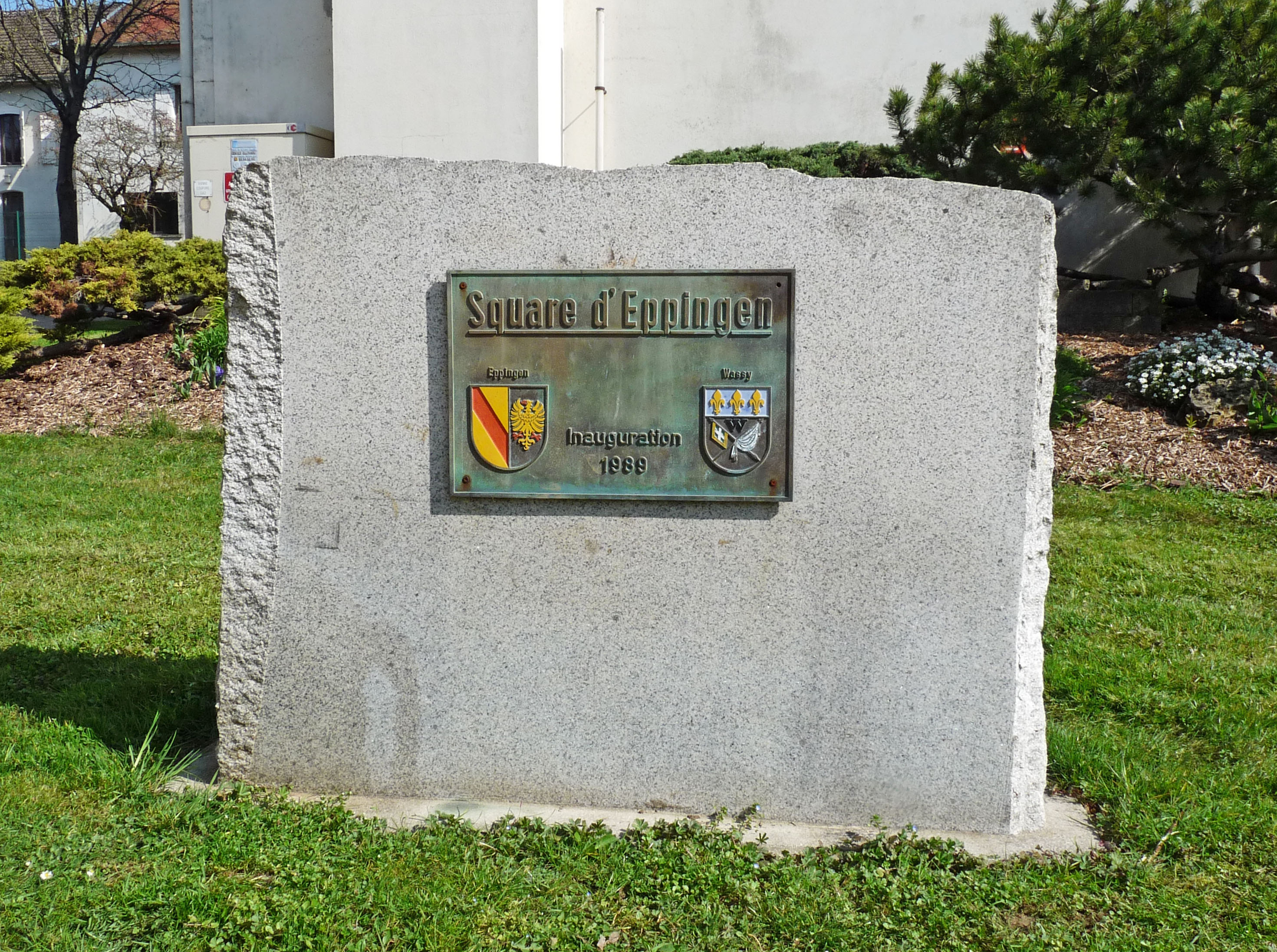 Square d'Eppingen (ville jumelée) à Wassy (Haute-Marne), inauguré en 1989